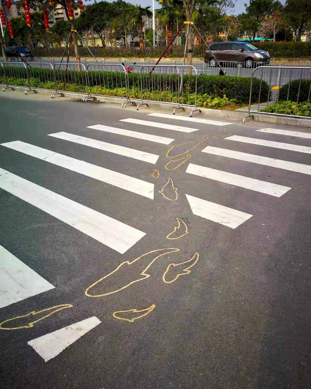 深圳西湾公园前的艺术斑马线